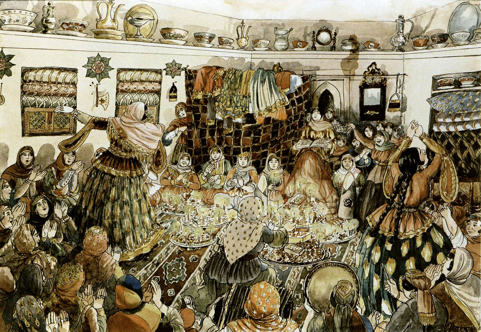 Women wedding